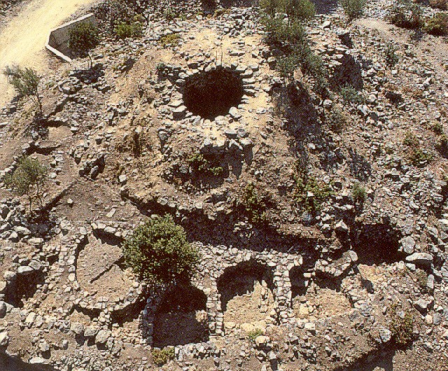 Fonte: Fabrizio Muggianu, fotografia del nuraghe di Bau Nuraxi Triei, licenza cc-by.